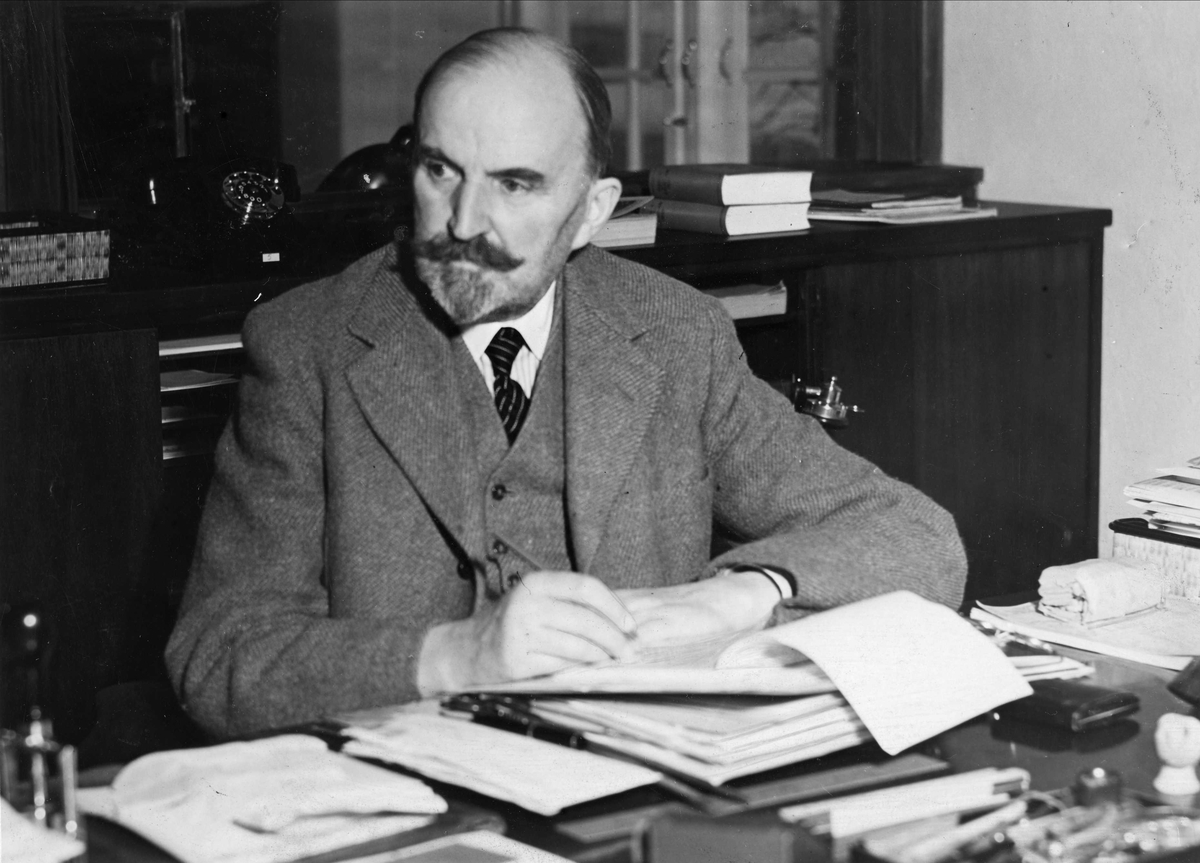 Museumsdirektør Hans Jacob Aall, ca. 1935